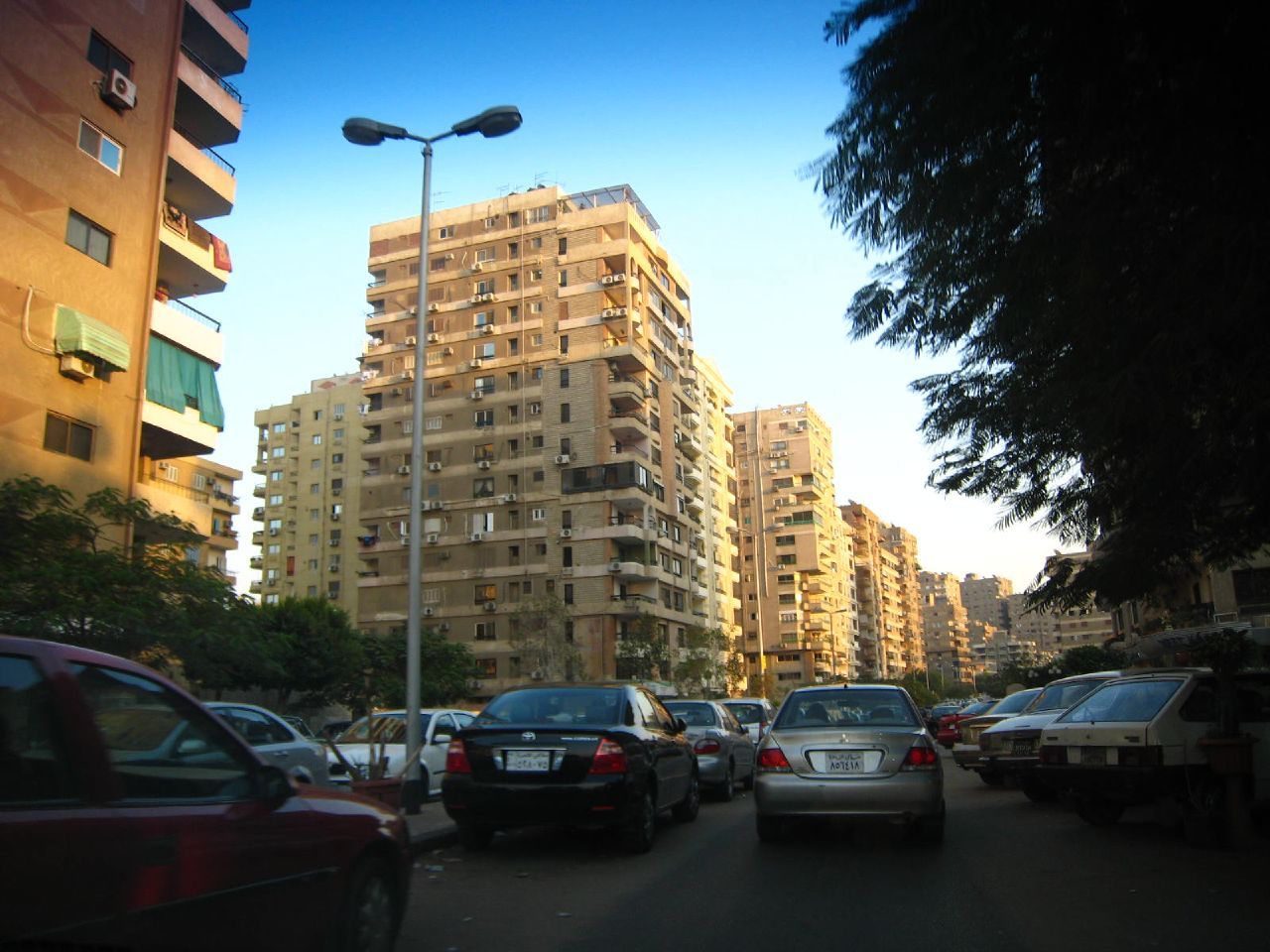 Cairo, Egypt